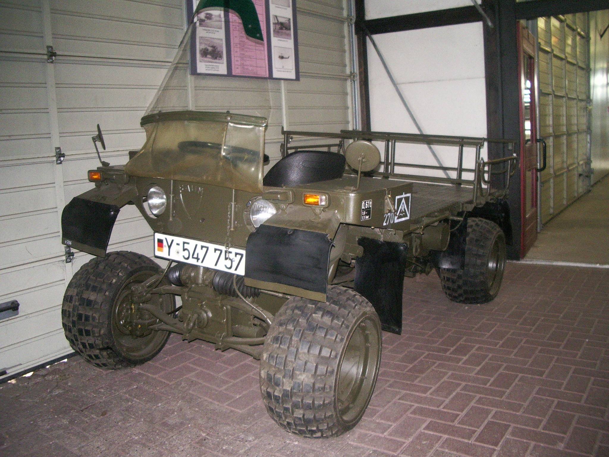 Kraka Typ 640 (4 x 2) Besatzung: 2/3 Soldaten Gewicht: 1,61 Tonnen Motorleistung: 19 kW (26 PS) Bewaffnung: 1 MG 20mm L/85 oder 6 Panzerabwehr-Lenkflugkörper TOW (Reichweite 55 - 3000 Meter) Besonderheiten: Mit Panzerabwehr-Lenkflugkörper TOW nachtkampffähig Baujahr: 1974 - 1975 Stückzahl: 862